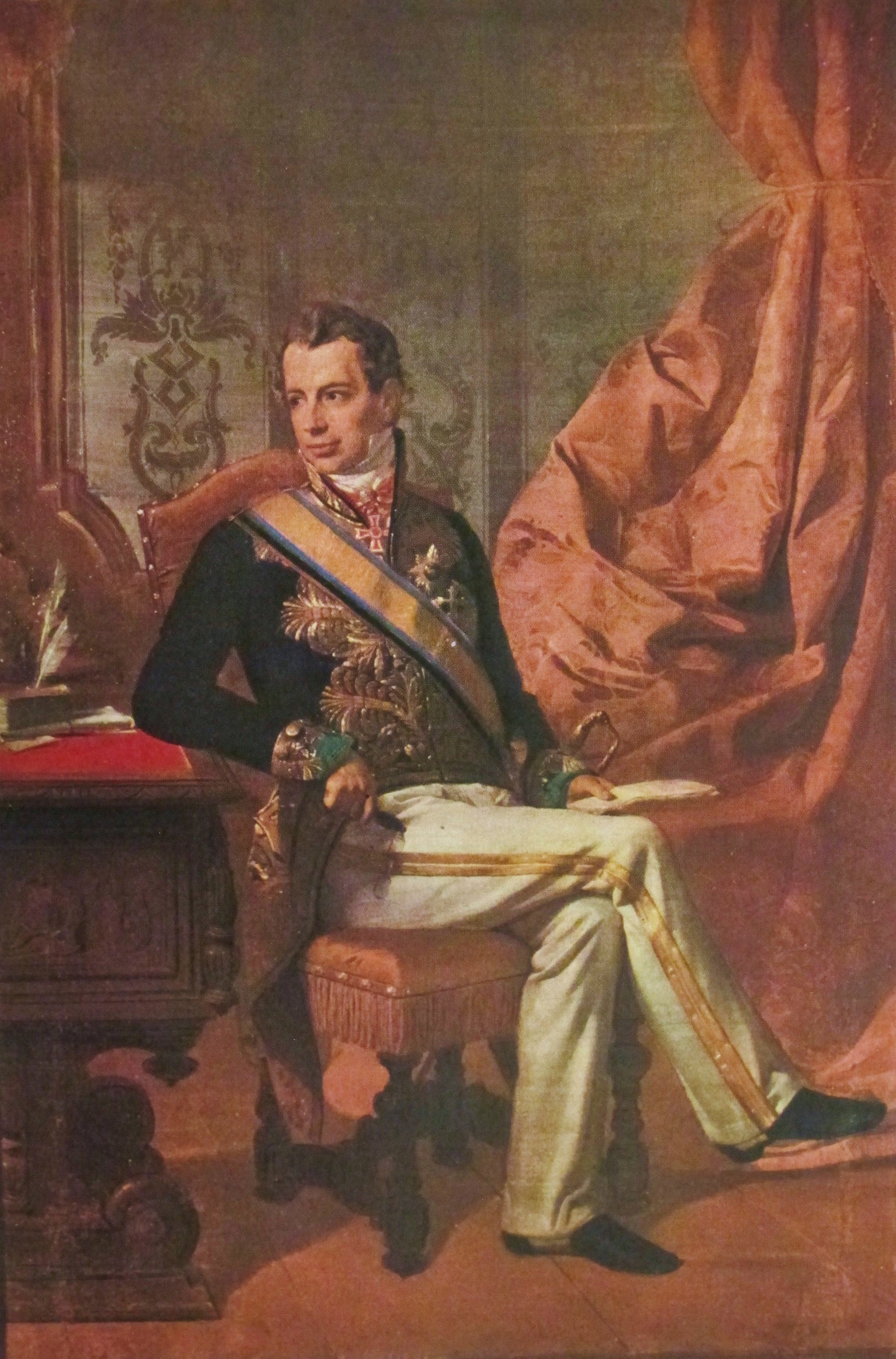 G. Molteni, Ritratto del conte Giacomo Mellerio, gran cancelliere del Regno Lombardo-Veneto e benefattore dell'Ospedale maggiore di Milano, olio su tela, Raccolte d'arte dell'Ospedale maggiore di Milano.